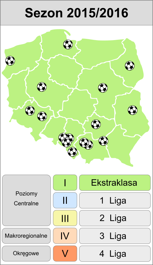 Jagiellonia w sezonie 2015/2016 - mapa